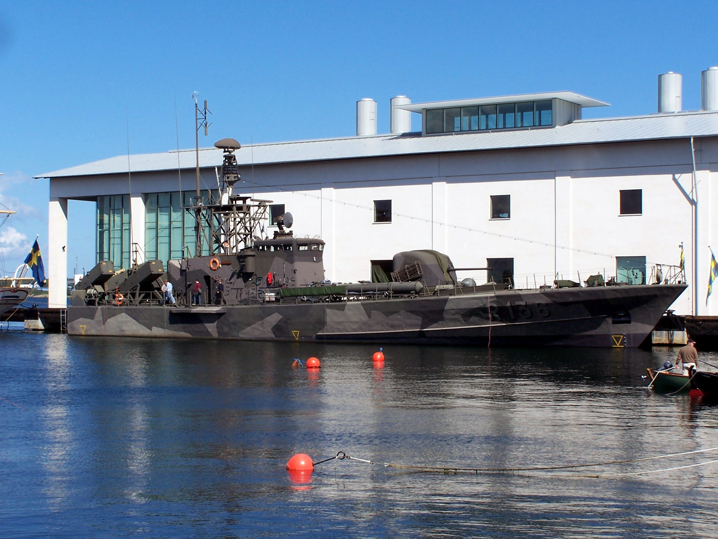 HMS Västervik vid Marinmuseum i Karlskrona